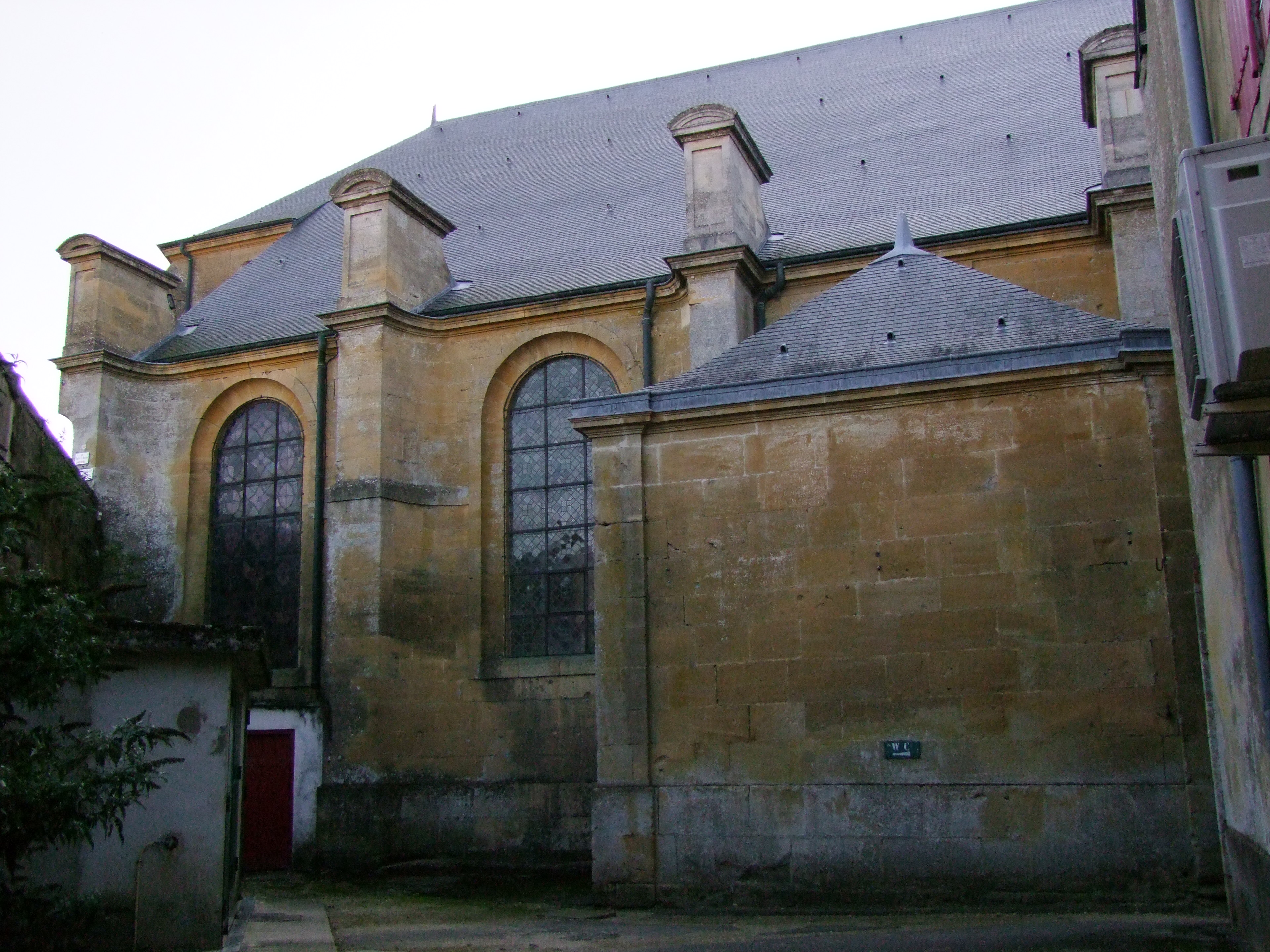 Façade nord de Saint-Martin et chapelle Malandry, Montmédy, Meuse, France